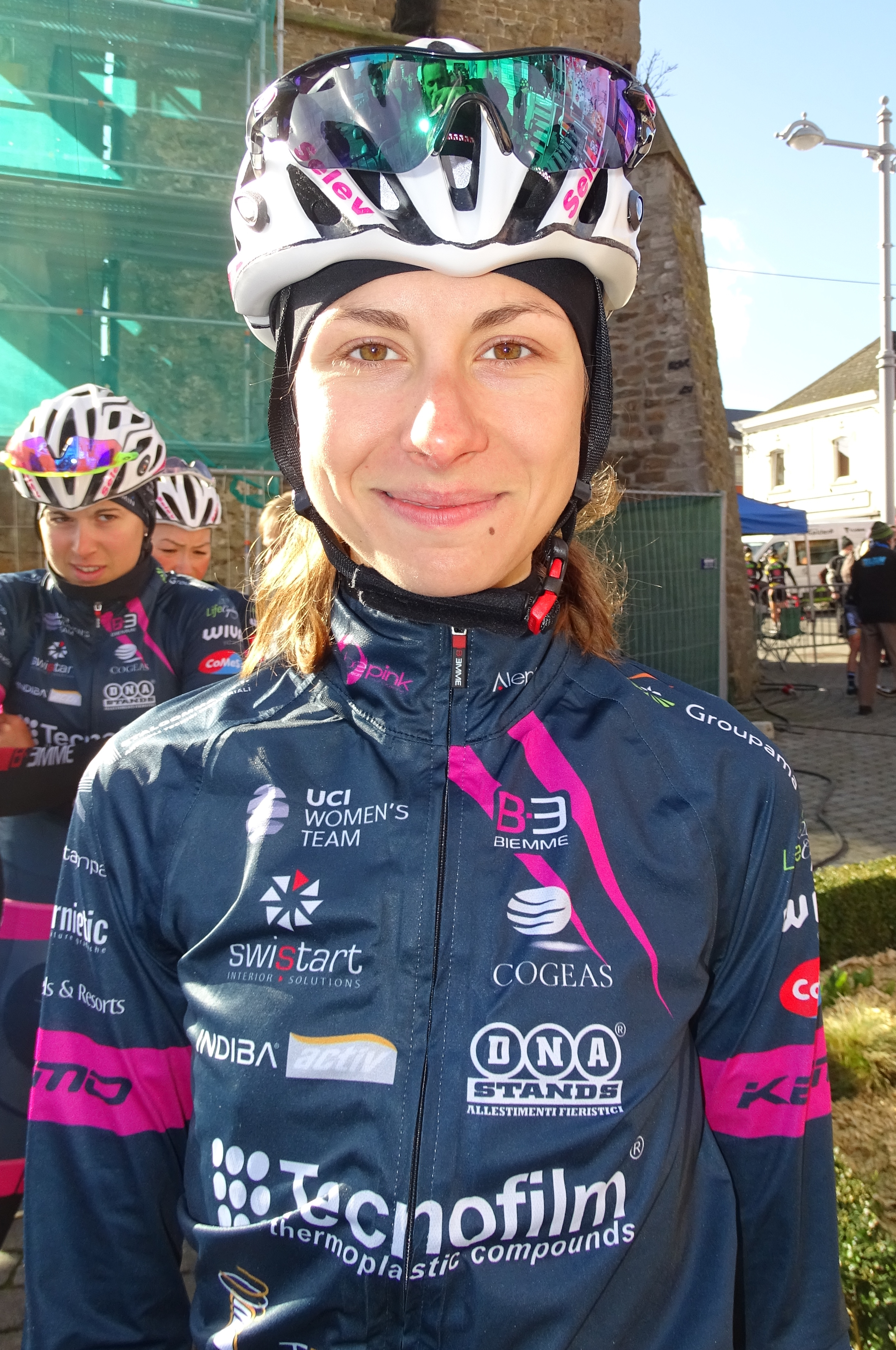 Reportage réalisé le mercredi 2 mars à l'occasion du départ du Samyn des Dames 2016 et du Samyn 2016 à Quaregnon, Belgique.